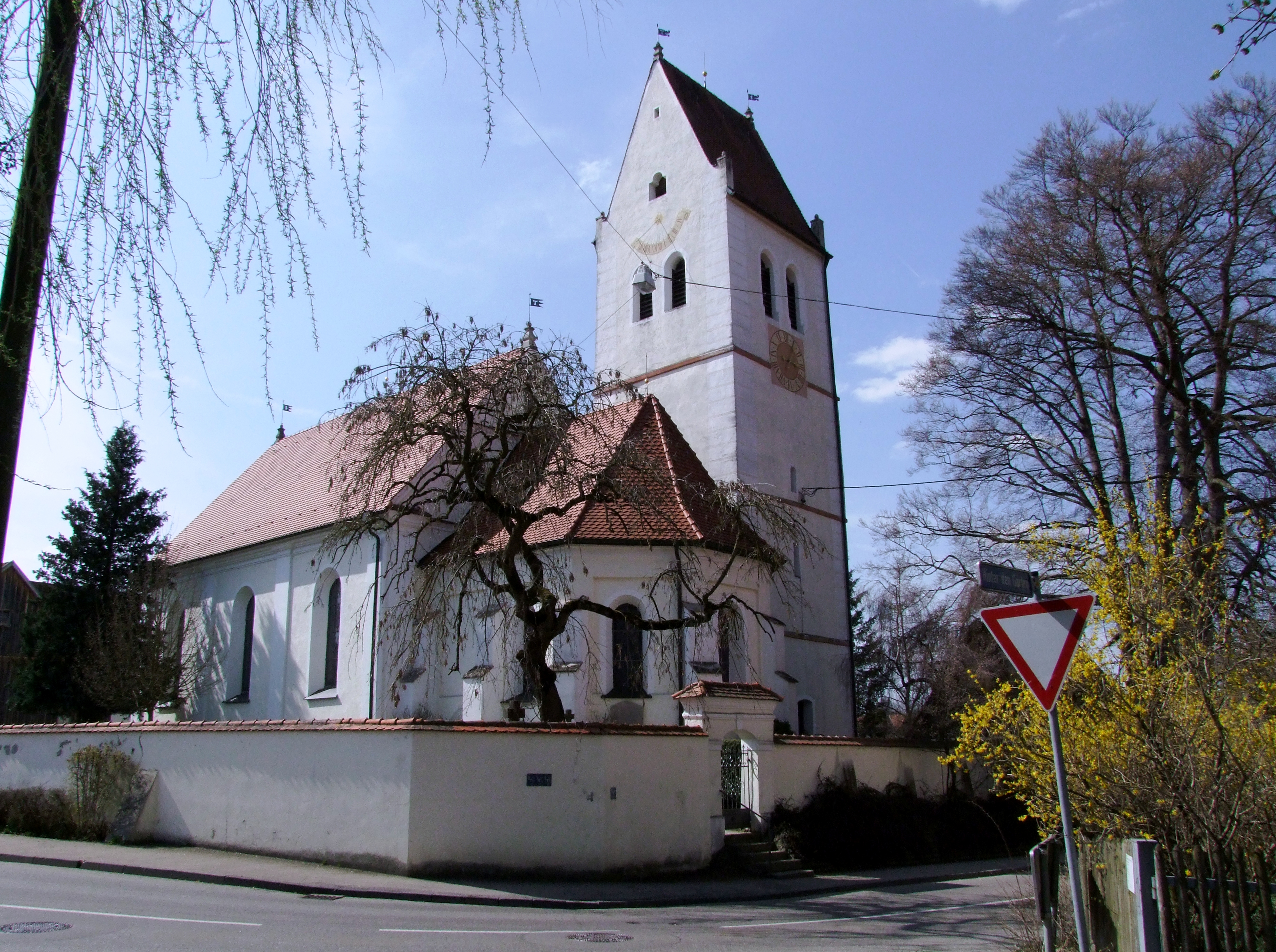 St. Agathe im oberschwäbischen Dickenreishausen, einem Stadtteil von Memmingen.